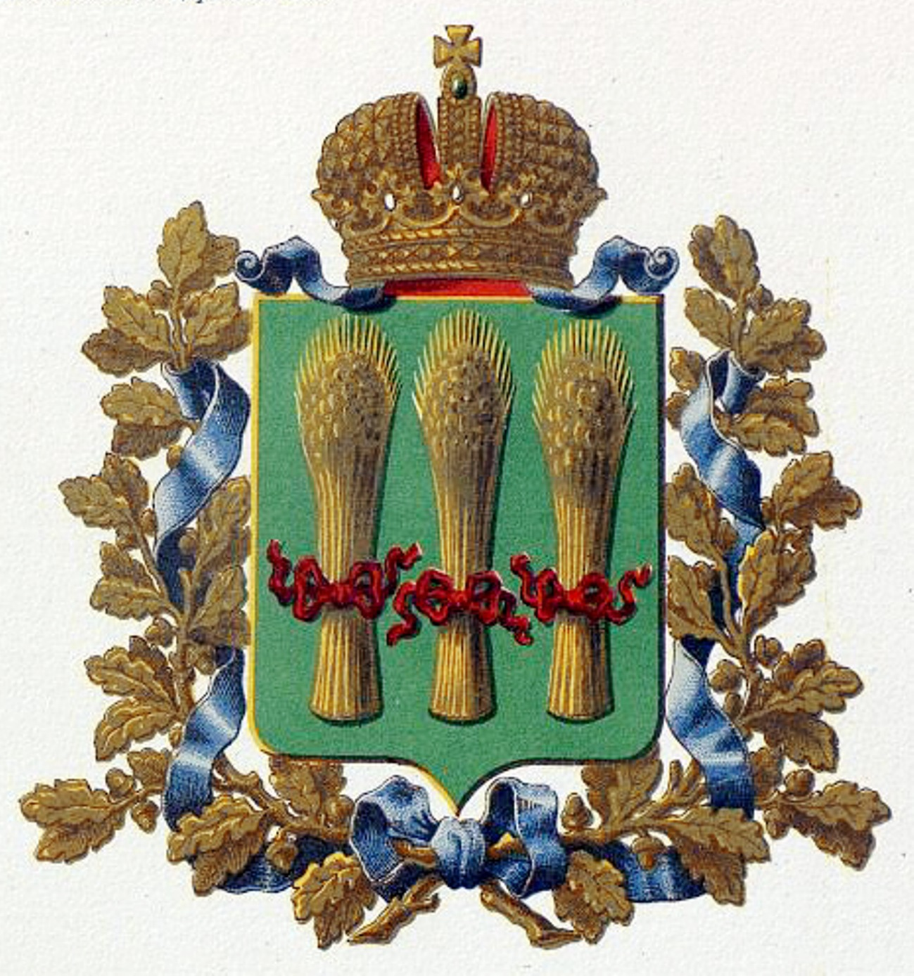 Official Russian Empire coat of arms Penza Governorate. Герб Российской Империи Пензенской губернии в Гербовнике МВД. Утверждён Императором Всероссийским Александром Вторым в 1878 году.